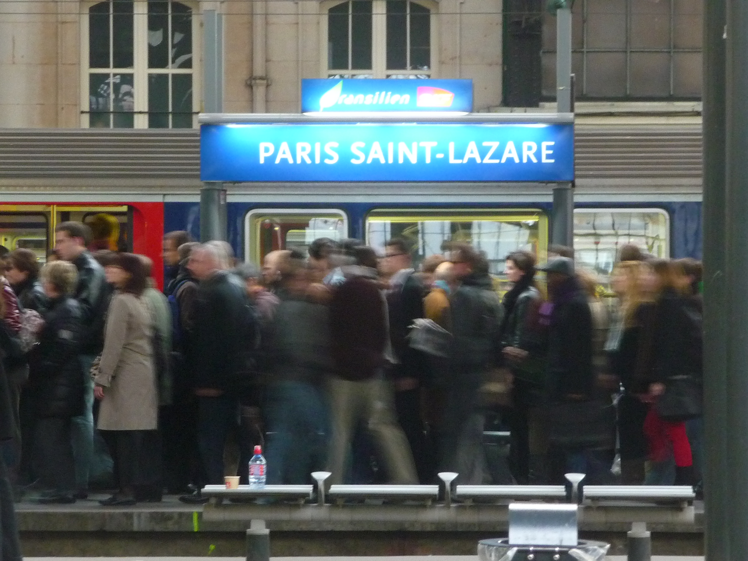 Foule à Paris-Saint-Lazare.